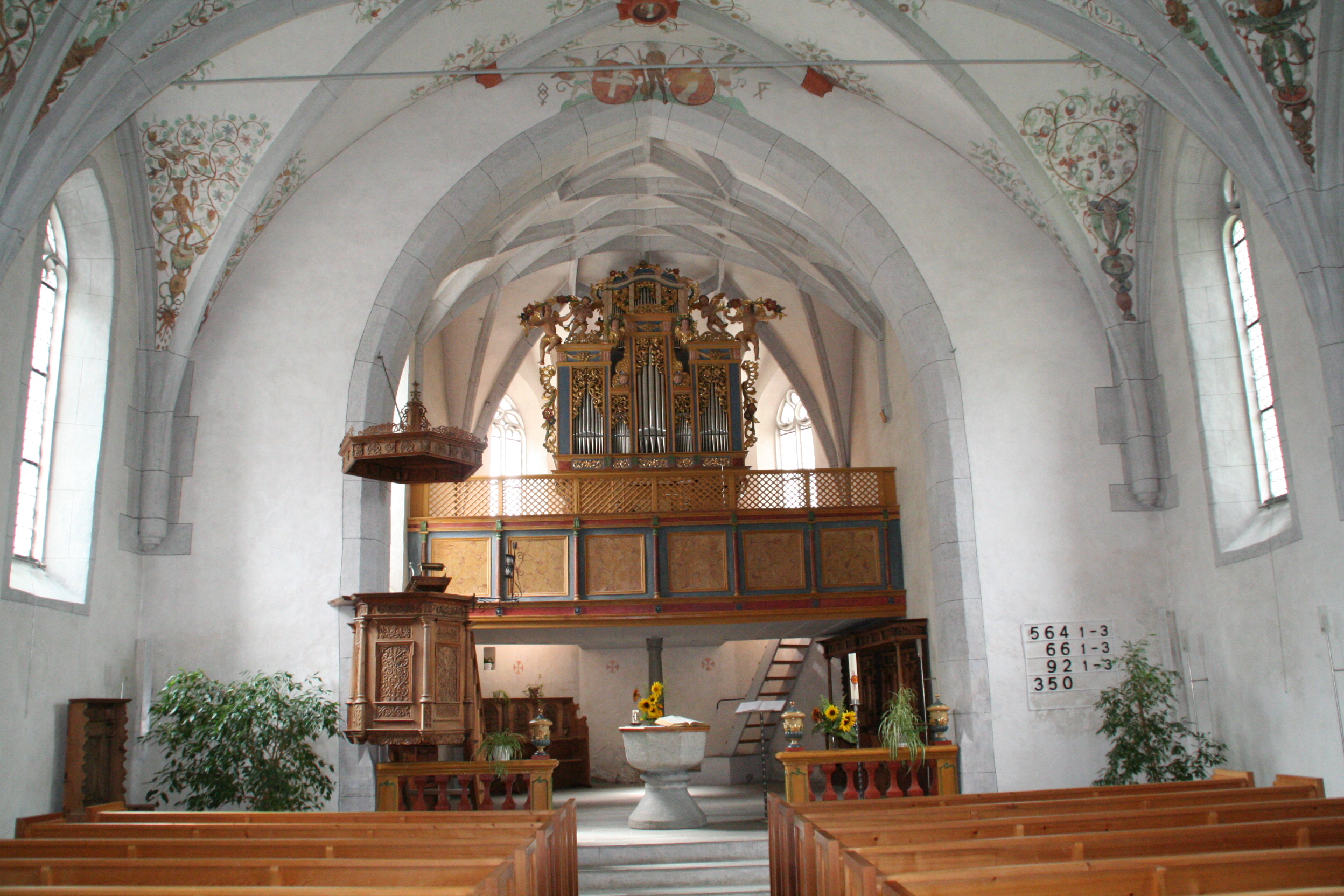 Reformierte Kirche Ilanz Innenraum